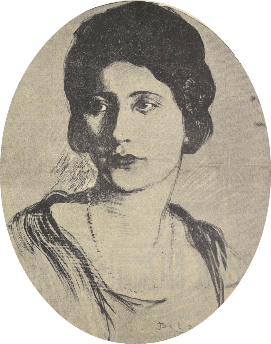 Graciela Letelier Velasco (Rancagua, 24 de agosto de 1883 - Santiago, 4 de septiembre de 1969) fue primera dama de Chile, segunda cónyuge del general y presidente de Chile Carlos Ibáñez del Campo